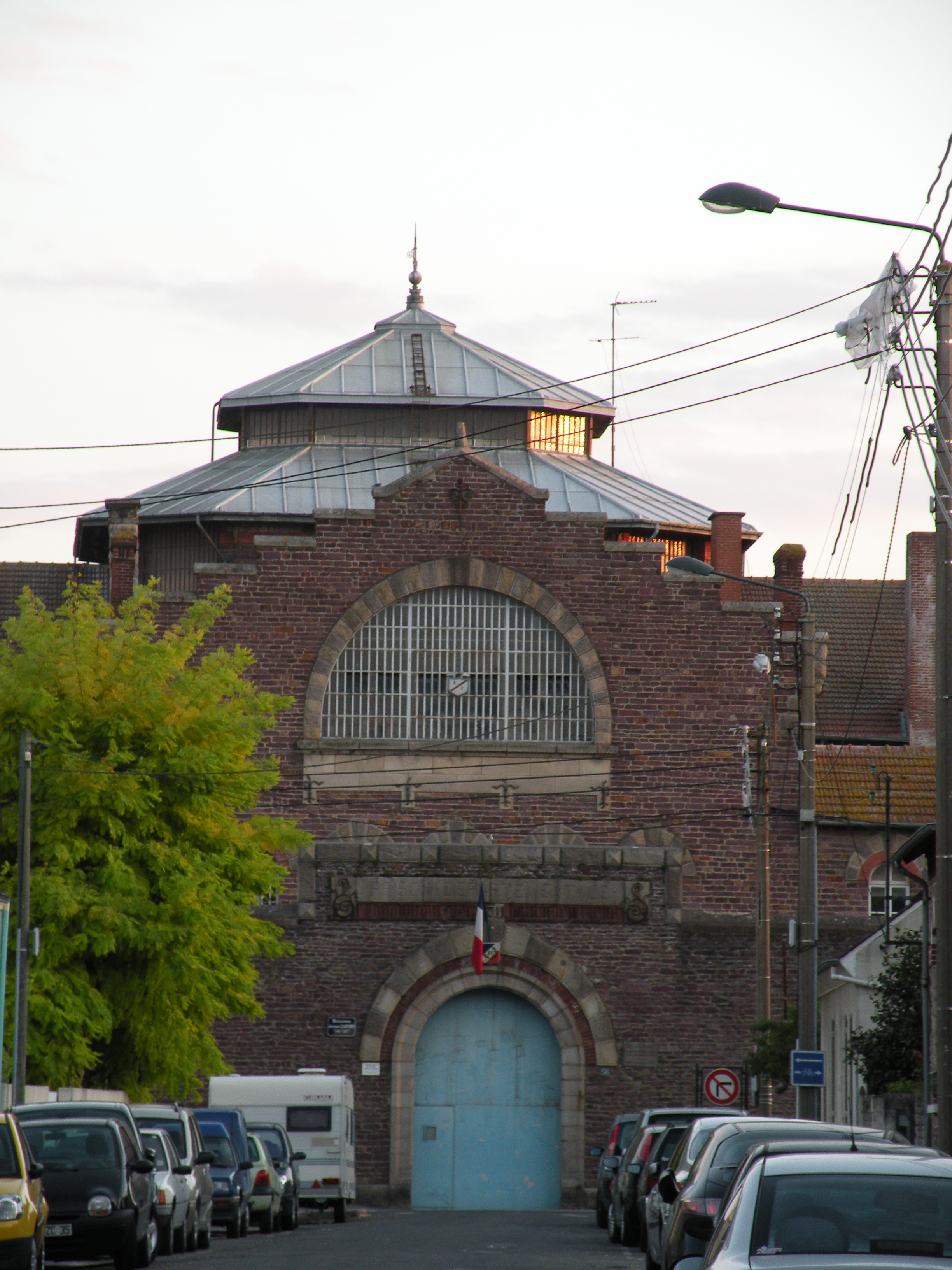 Prison départementale de Rennes, boulevard Jacques Cartier, construite de 1898 à 1903 par Jean-Marie Laloy.